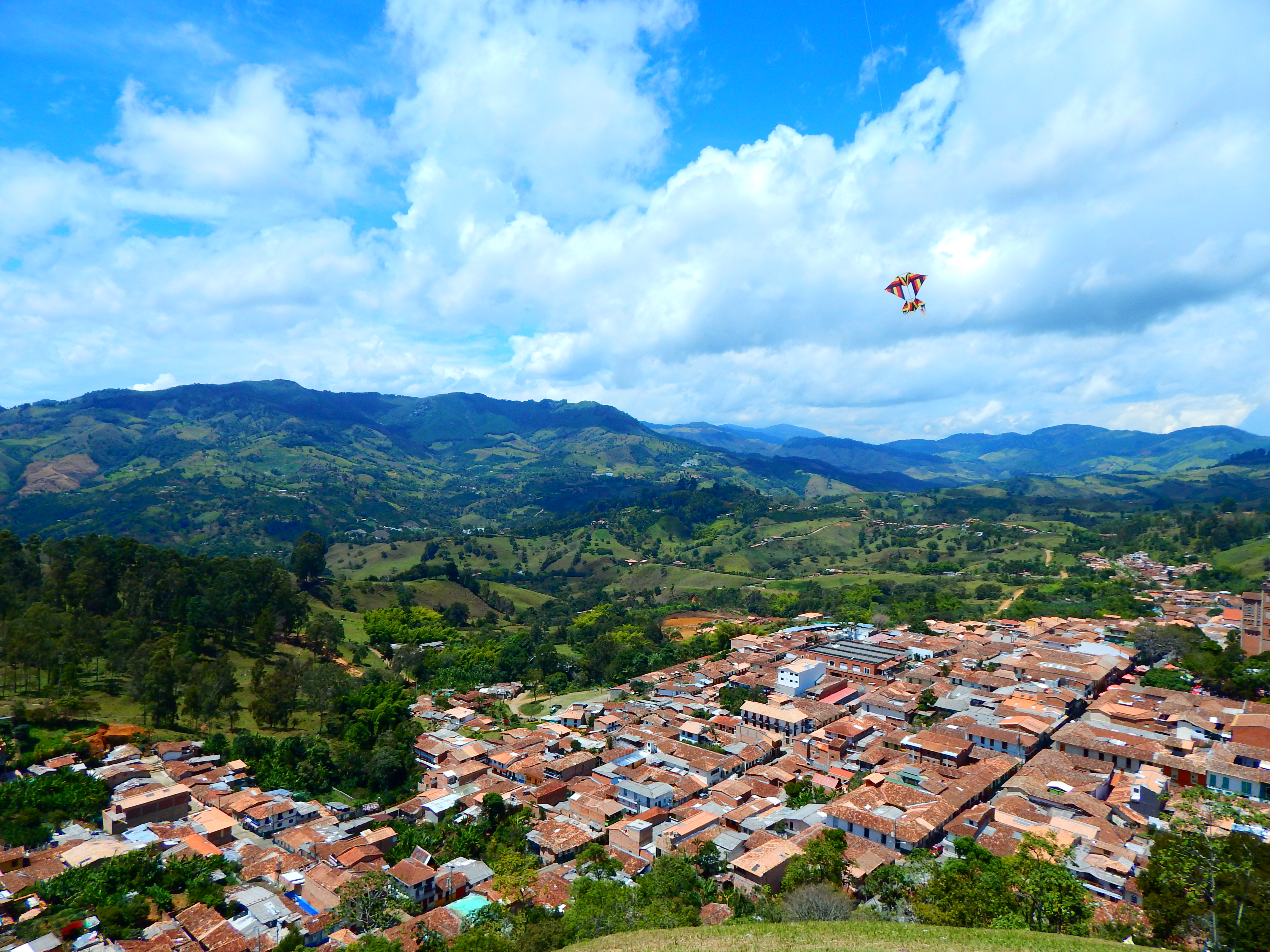 Esta fotografía fue tomada en el municipio colombiano con código 05368.